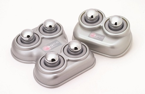 マジコ快癒器 左：bino（2球式）右：quattro（4球式）